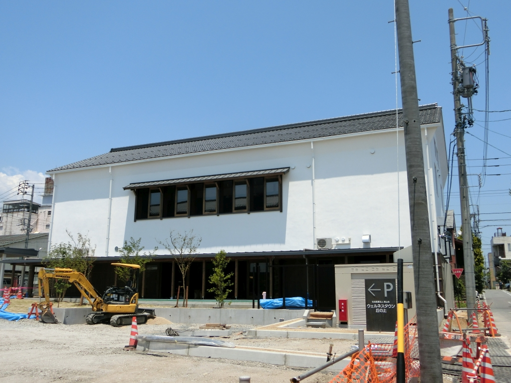 飯田市仲ノ町にあった喜久水酒造の旧蔵。現在改良中